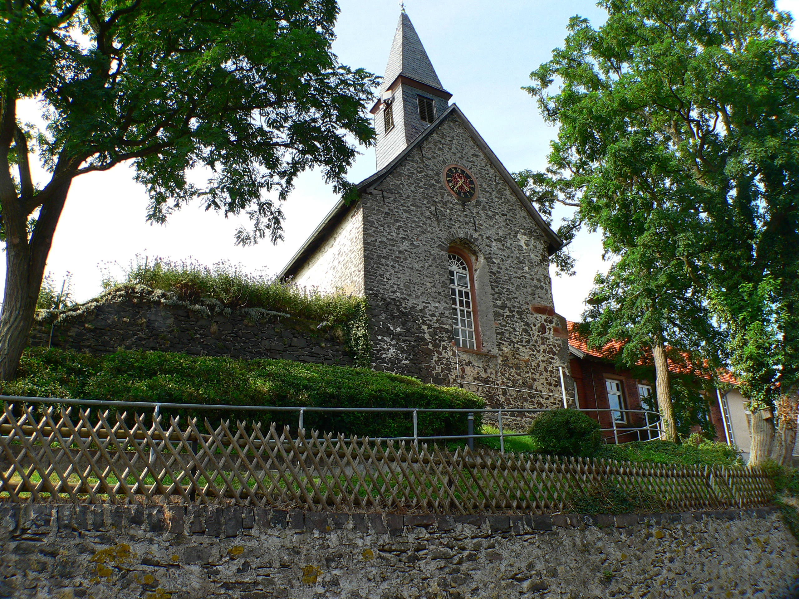 Dorfkirche von Stornfels, Stadtteil der Stadt Nidda in Hessen, Deutschland. Erbaut um 1850 aus der Zehntscheune der ehemaligen Burg Stornfels (800-1300)